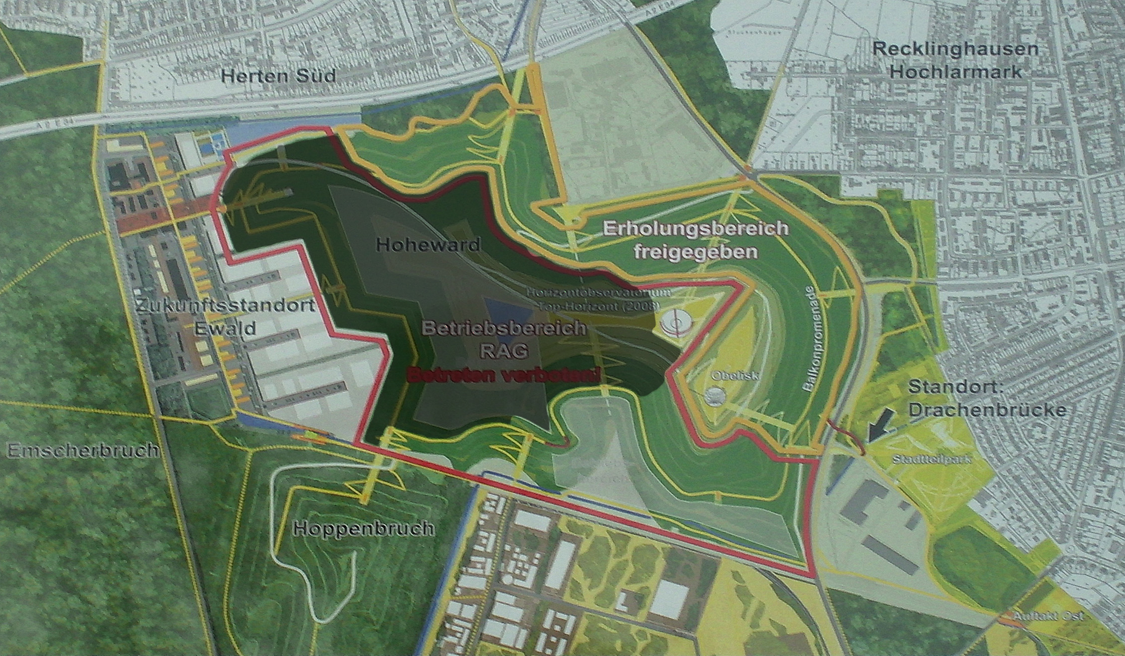 Infotafel auf Halde Hoheward Der rotbegrenzte Bereich ist seit dem 8. November 2008für die Öffentlichkeit freigegeben. Der dunkle Bereich kennzeichnet die aktuelle Sperrung (Juni 2009).